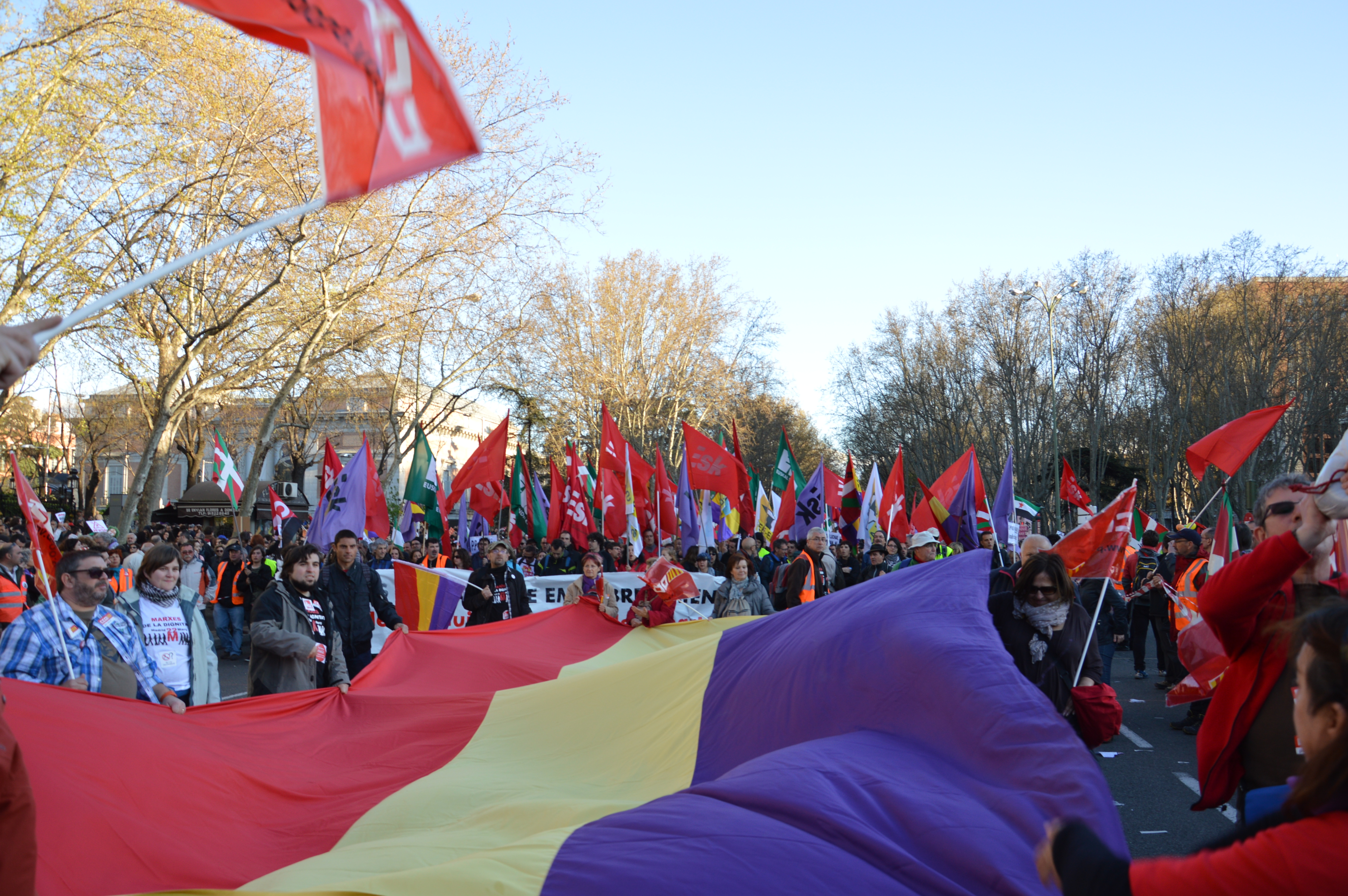 Miembros de Izquierda Anticapitalista en la Marcha por la Dignidad desplegando una gran bandera republicana española